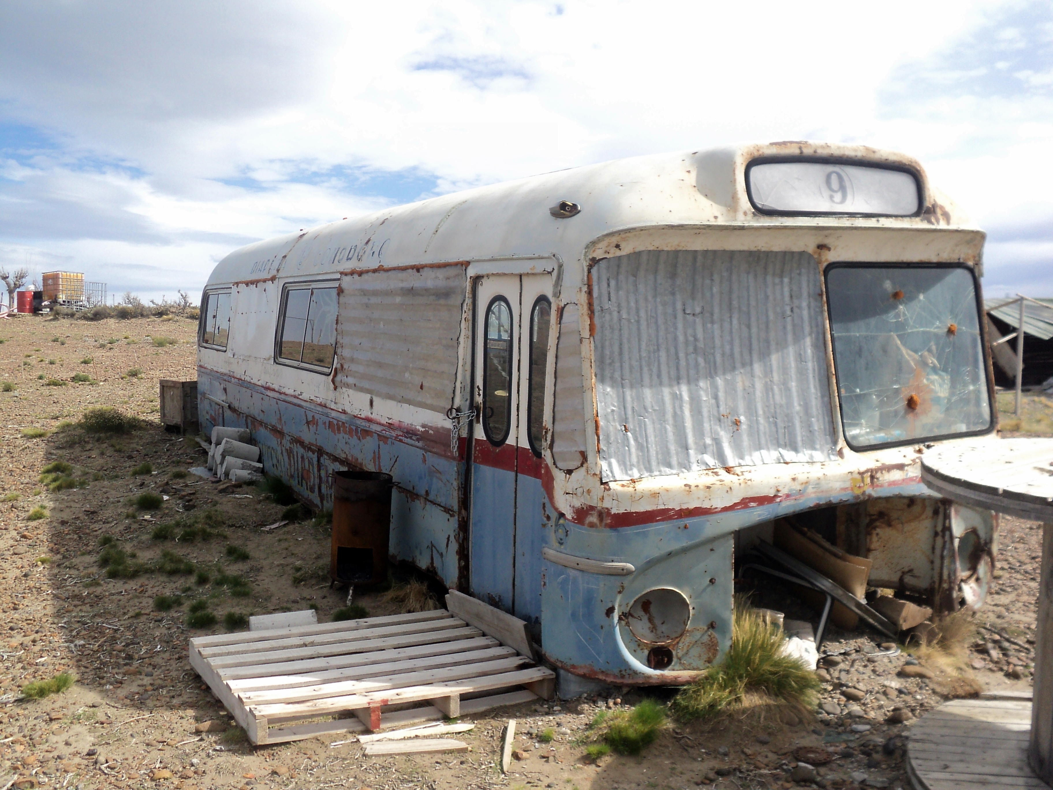 Vista frontal del coche motor en el barrio comodorense de chacras Caleta Olivares, usado como refugio